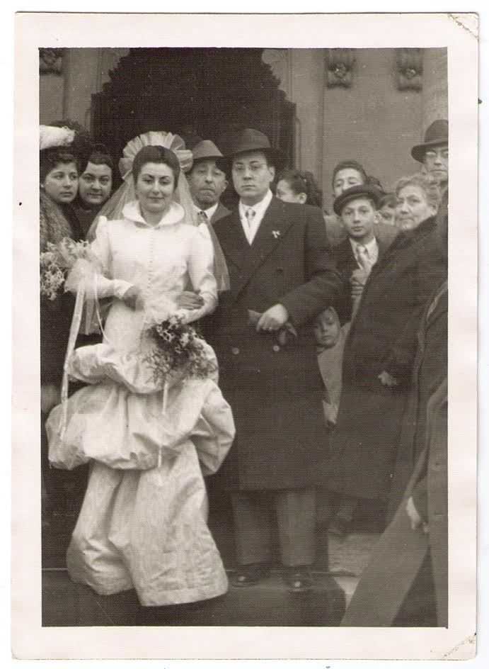 רומא 1949 - חתונתם של הרב סרג'ו יוסף סיארה ואורנלה פאיאליץ